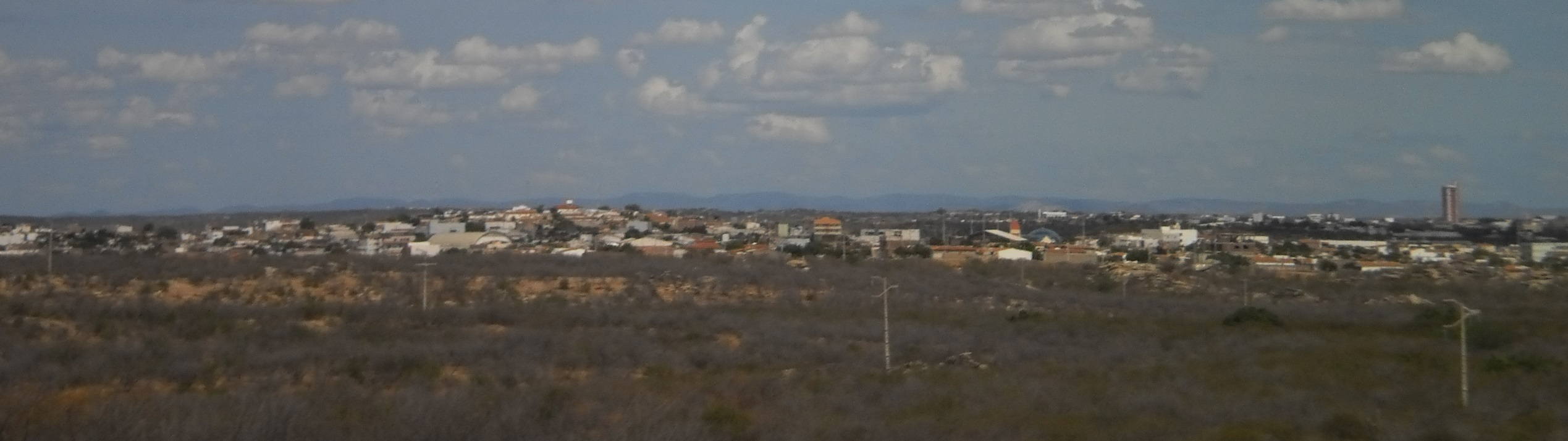 Vista panorâmica de Caicó a partir a BR-427. Rio Grande do Norte, Brasil.